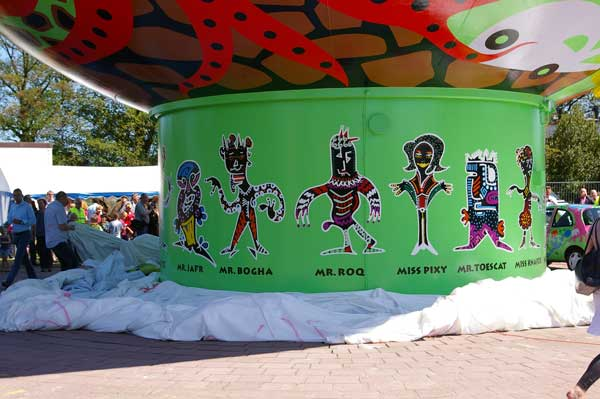 Puppets op de voet